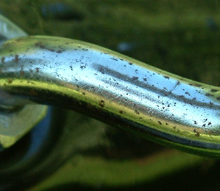 Flugrost -- nach dem Reinigen / rust film -- after cleaning